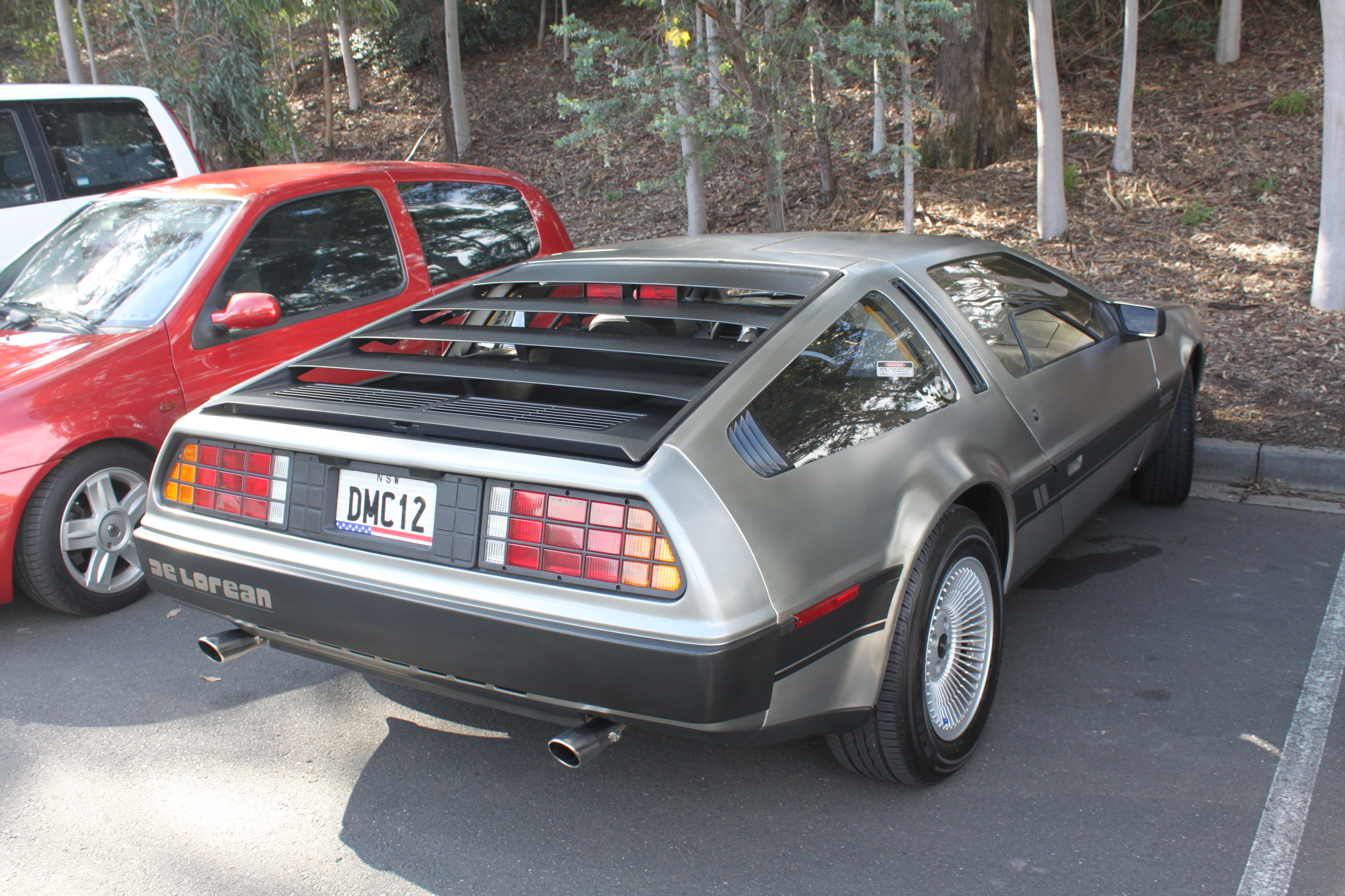 DeLorean DMC12